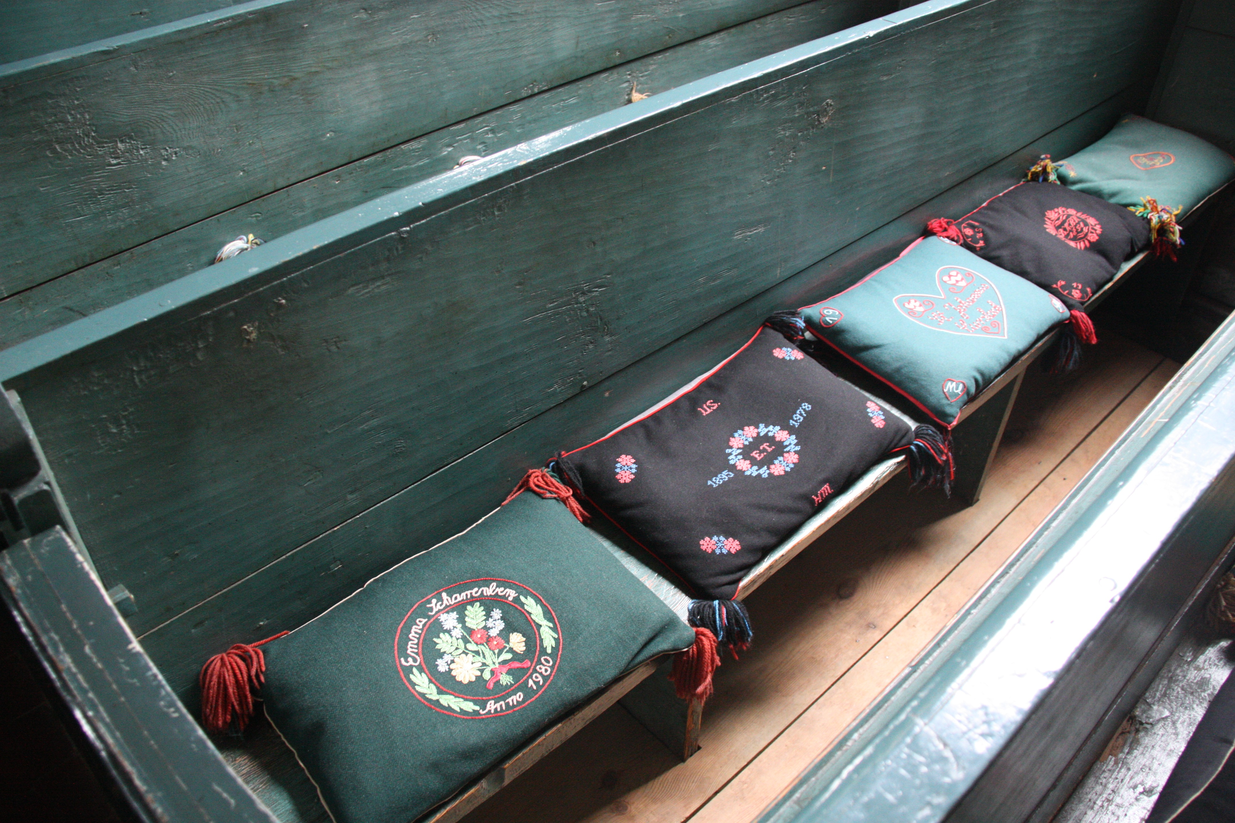 Hamburg, Curslack, St. Johannis-Kirche, SitzkissenThis is a photograph of an architectural monument.